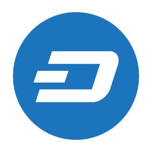 Dash